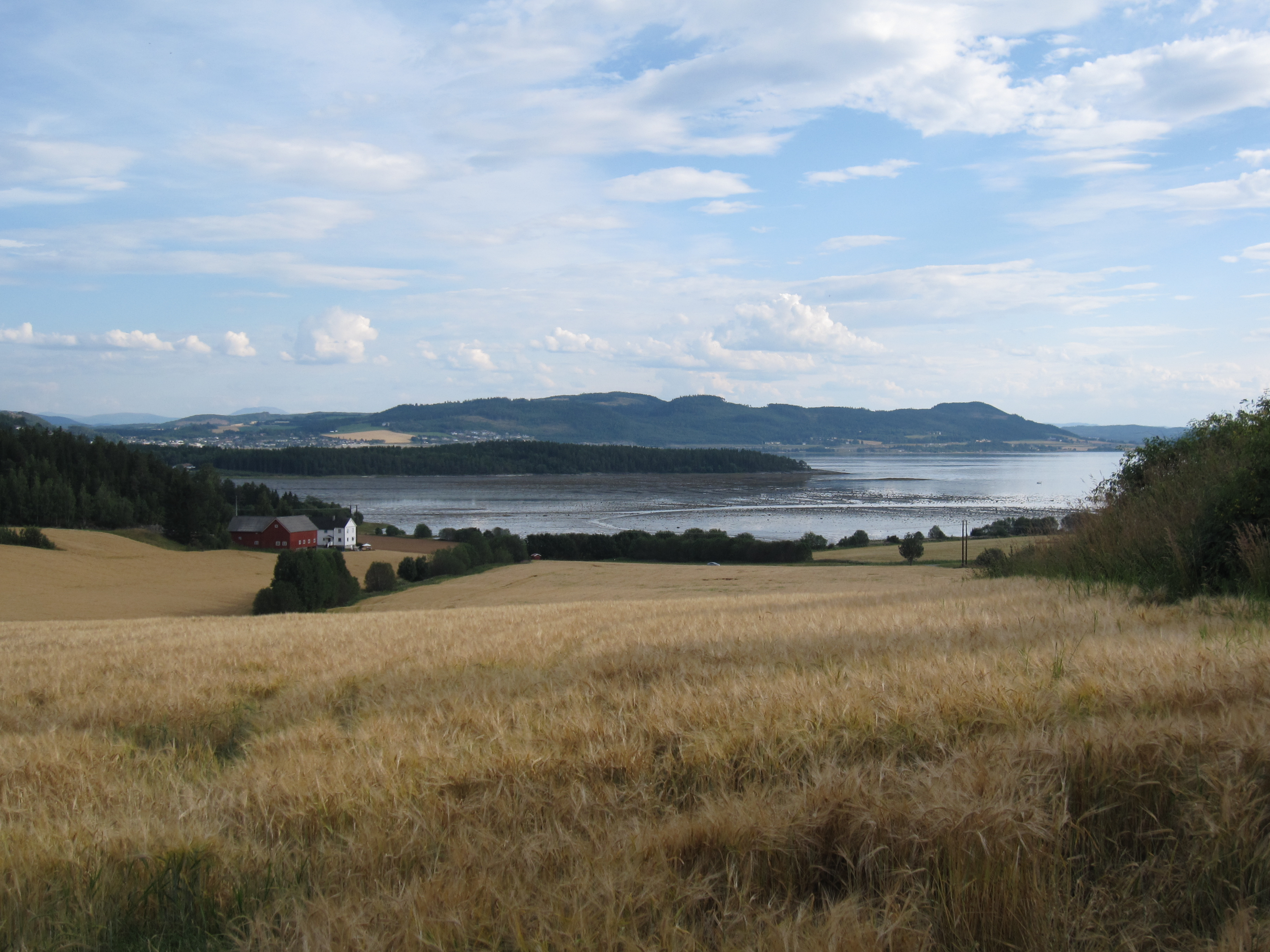 Utsikt frå Overrein gard mot Beitstadfjorden. Tidevatnet har gått ut. Biletet er teke kring halvannan time etter file:Beitstadfjorden foer tidevatnet har gaatt ut..jpg